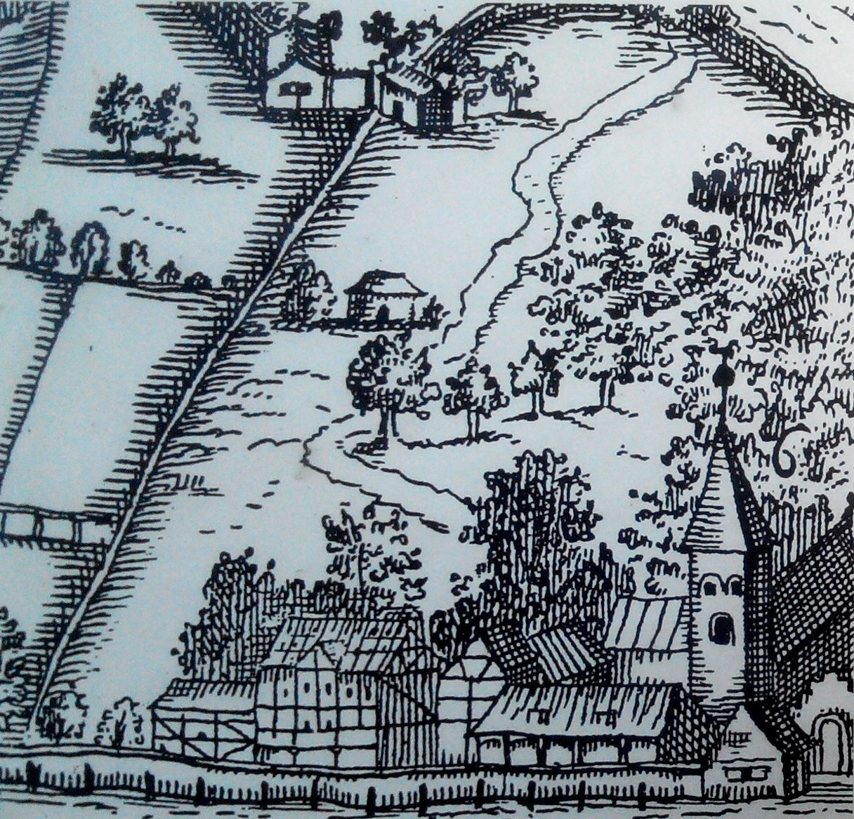 Der Nikolaihof 1588 nach einem Stich von Daniel Frese